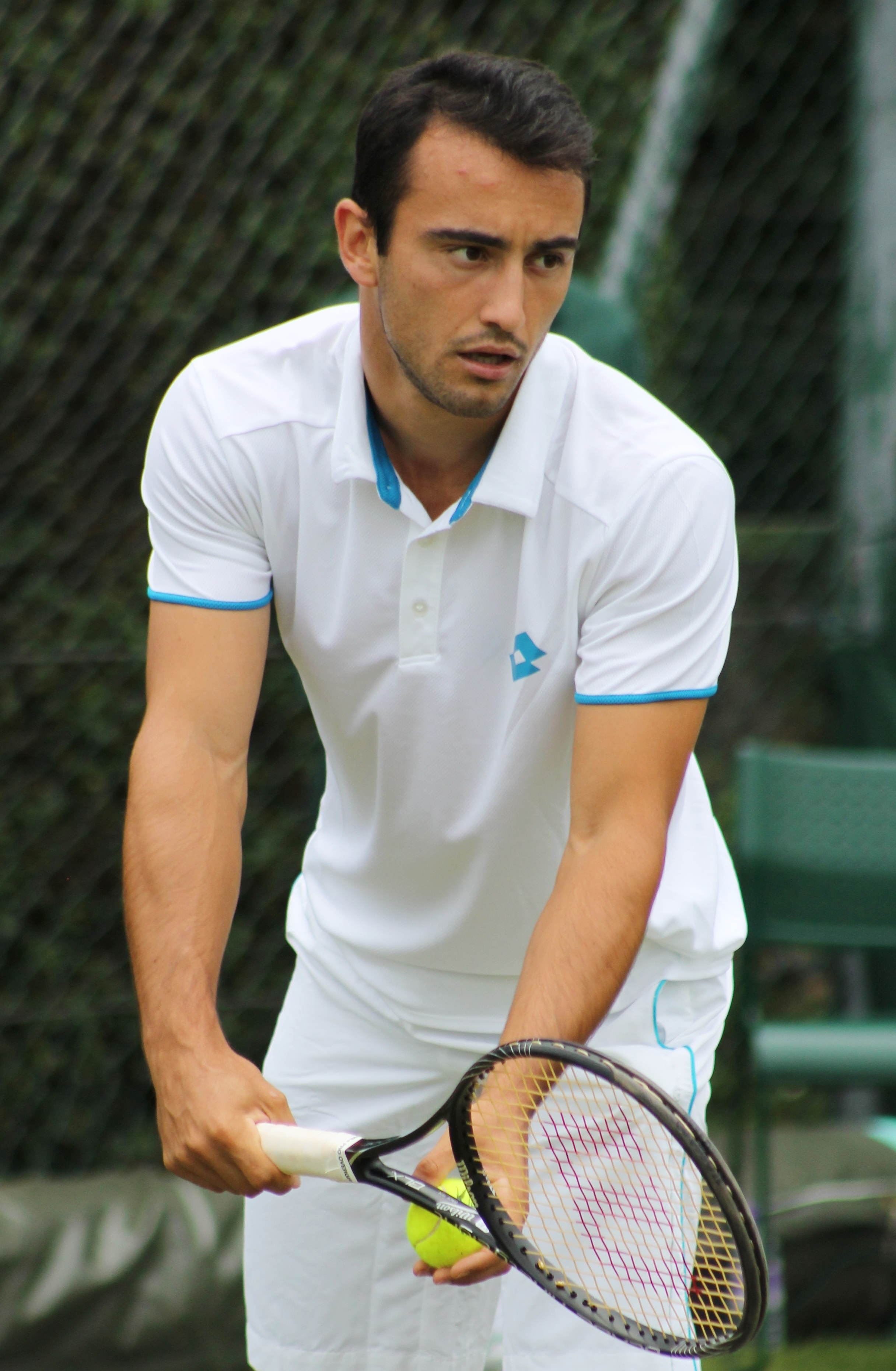 Giustino WMQ14 (6)